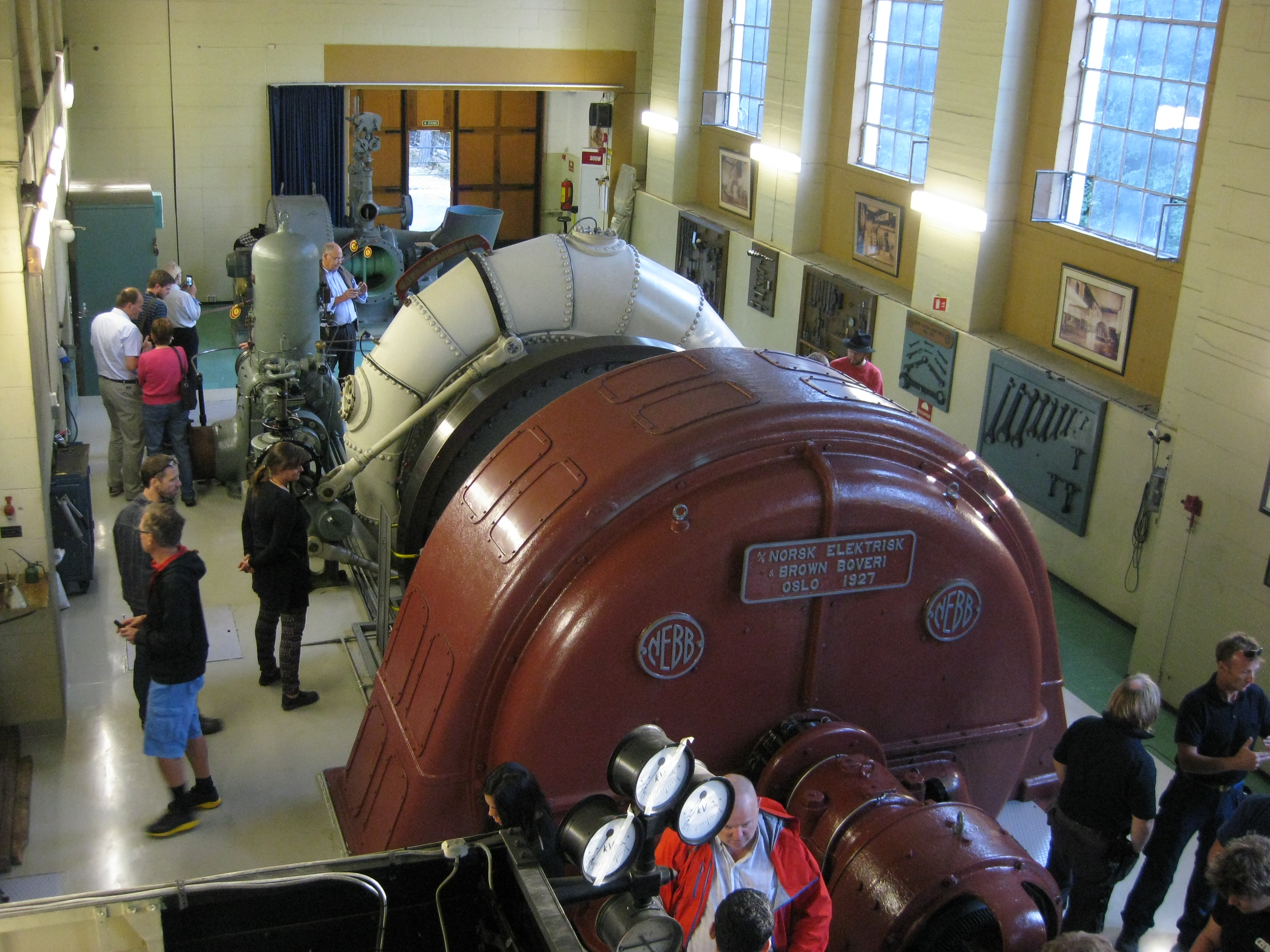 Hallen, Hammeren kraftstasjon